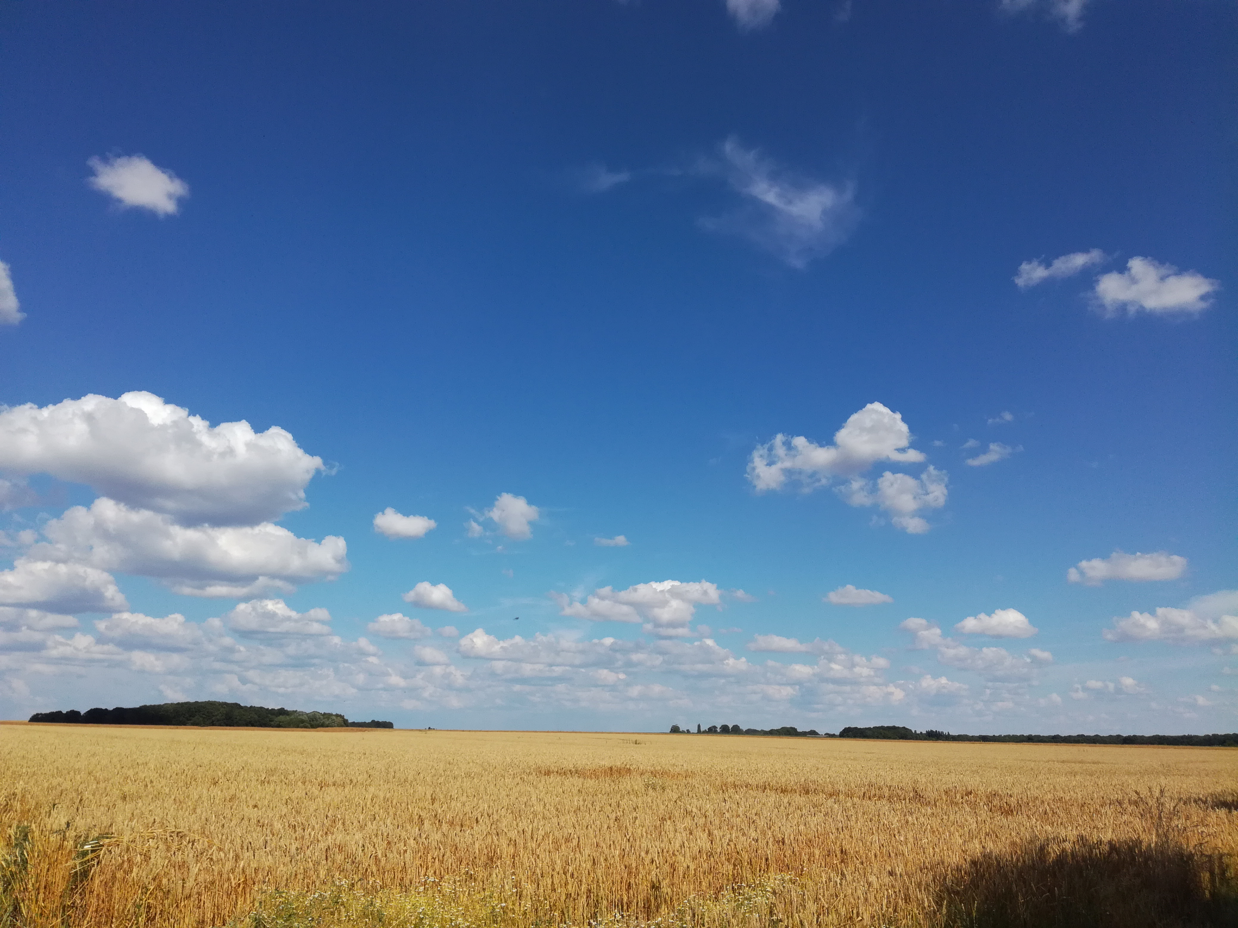 Champ de blé prêt à être moissonné dans le nord de Bréval en juillet 2018